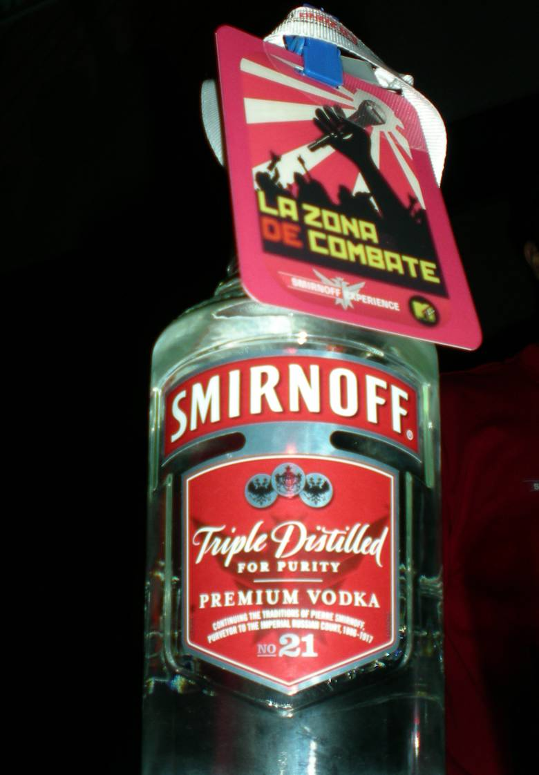 Botella Vodka Smirnoff